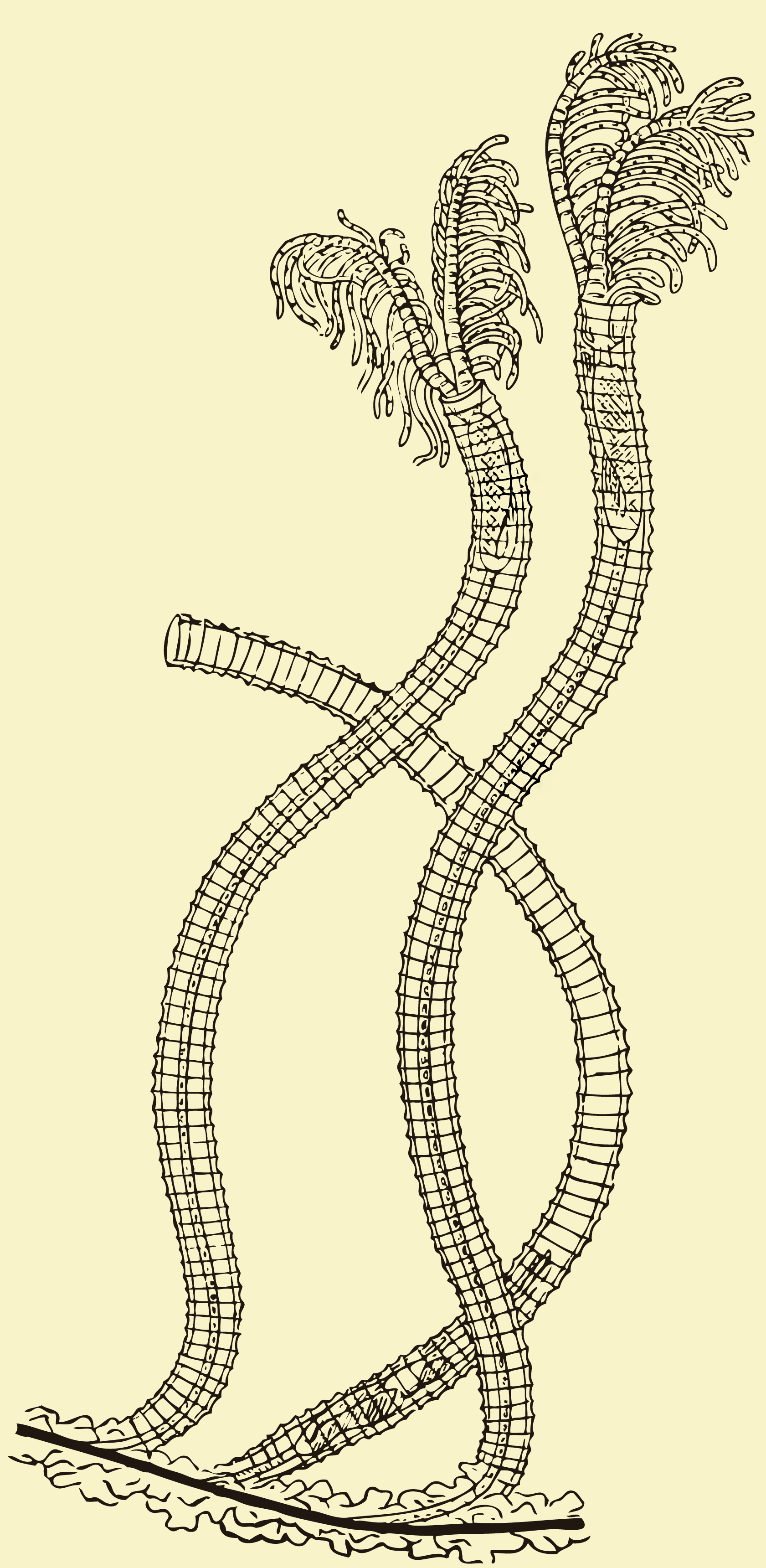 Rhabdopleura normani, Rhabdopleurida, Pterobranchia, Hemichordata. Derivado de ilustración: Sedgwick, A, Lister, JJ, Shipley, AE (1898) A student's text-book of zoology. S. Sonnenschein, Londres. Vol. 3, p.110, fig. 80. Autores fallecidos hace más de 70 años: Sedgwick, Adam (1854-1913) Lister, Joseph Jackson (1857-1927) Shipley, Arthur Everett (1861-1927) Ilustración basada en M'Intosh, William (1838-1931) Imagen obtenida a través de Internet Archive, escaneado original de la Wellcome Library, recortada, limpiada de rotulación y vectorizada.